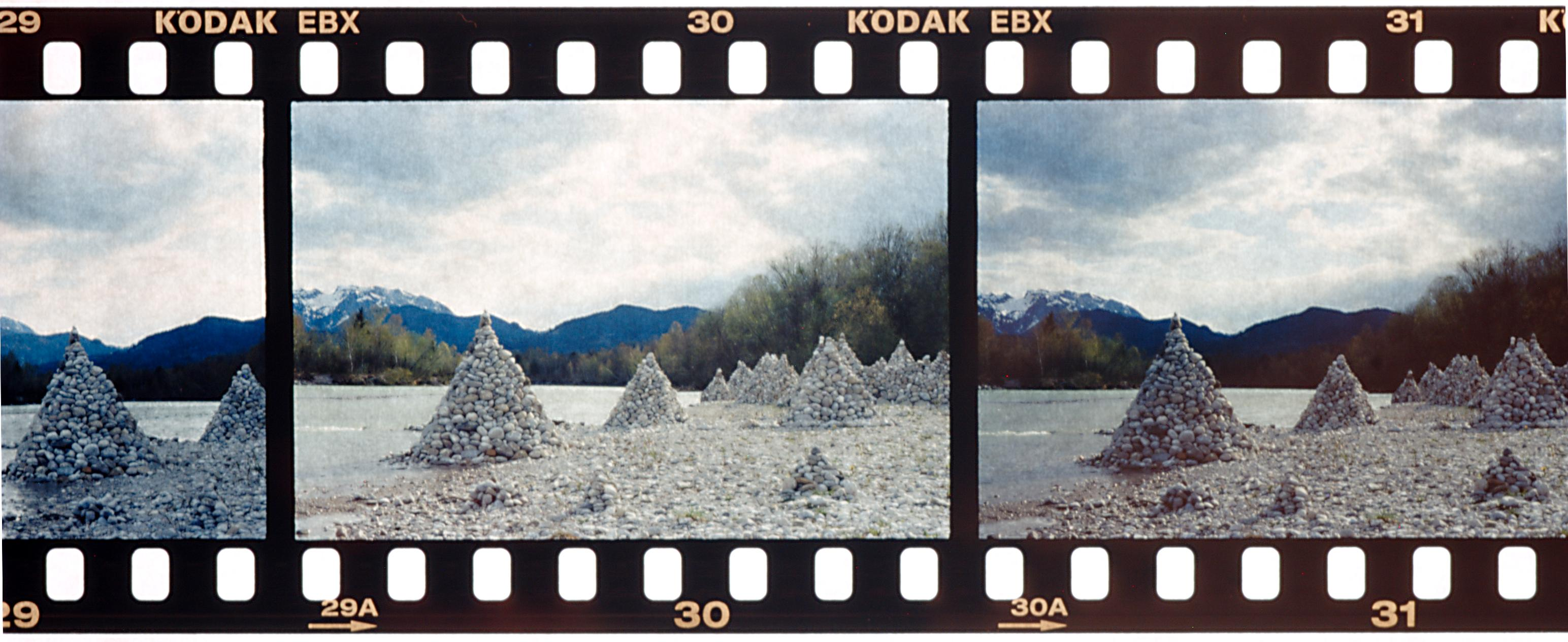 Beispiel eines Farb-Dia-Filmstreifens, Kleinbild, Kodak Elite Chrome 100